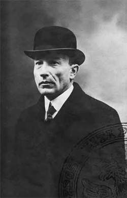 Савинков Борис Викторович. Фото с удостоверения Министерства военных дел Речи Посполитой